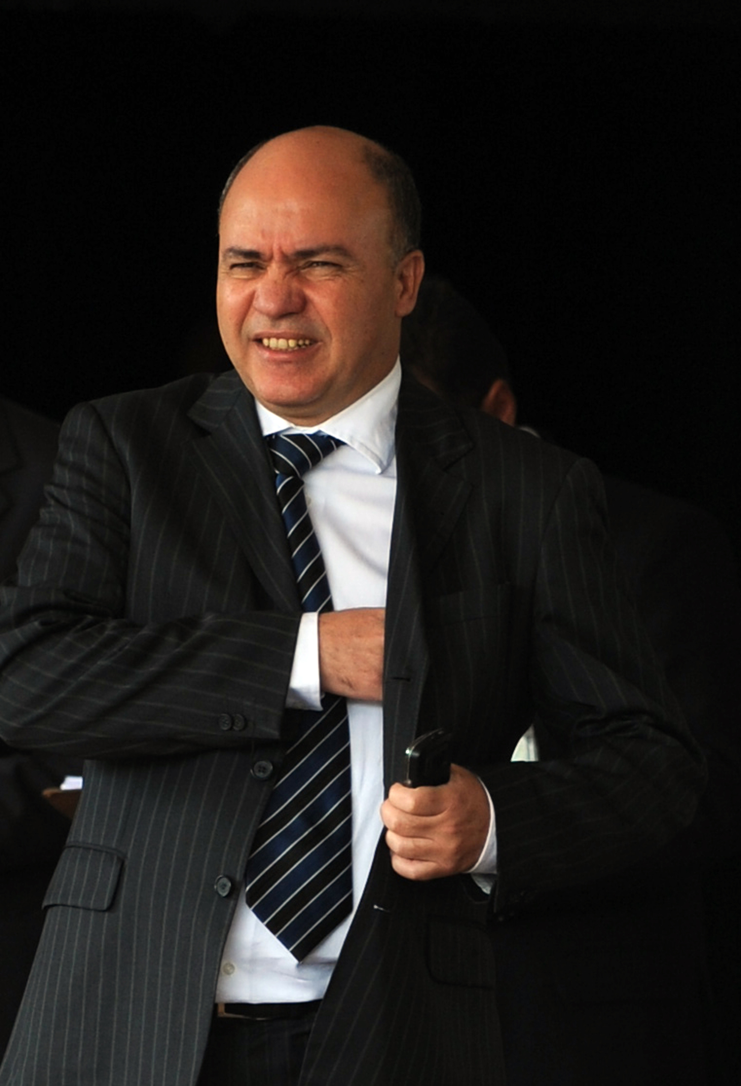 Carlos Eduardo Esteves Lima como Ministro interino da Casa Civil do Brasil em Brasília.